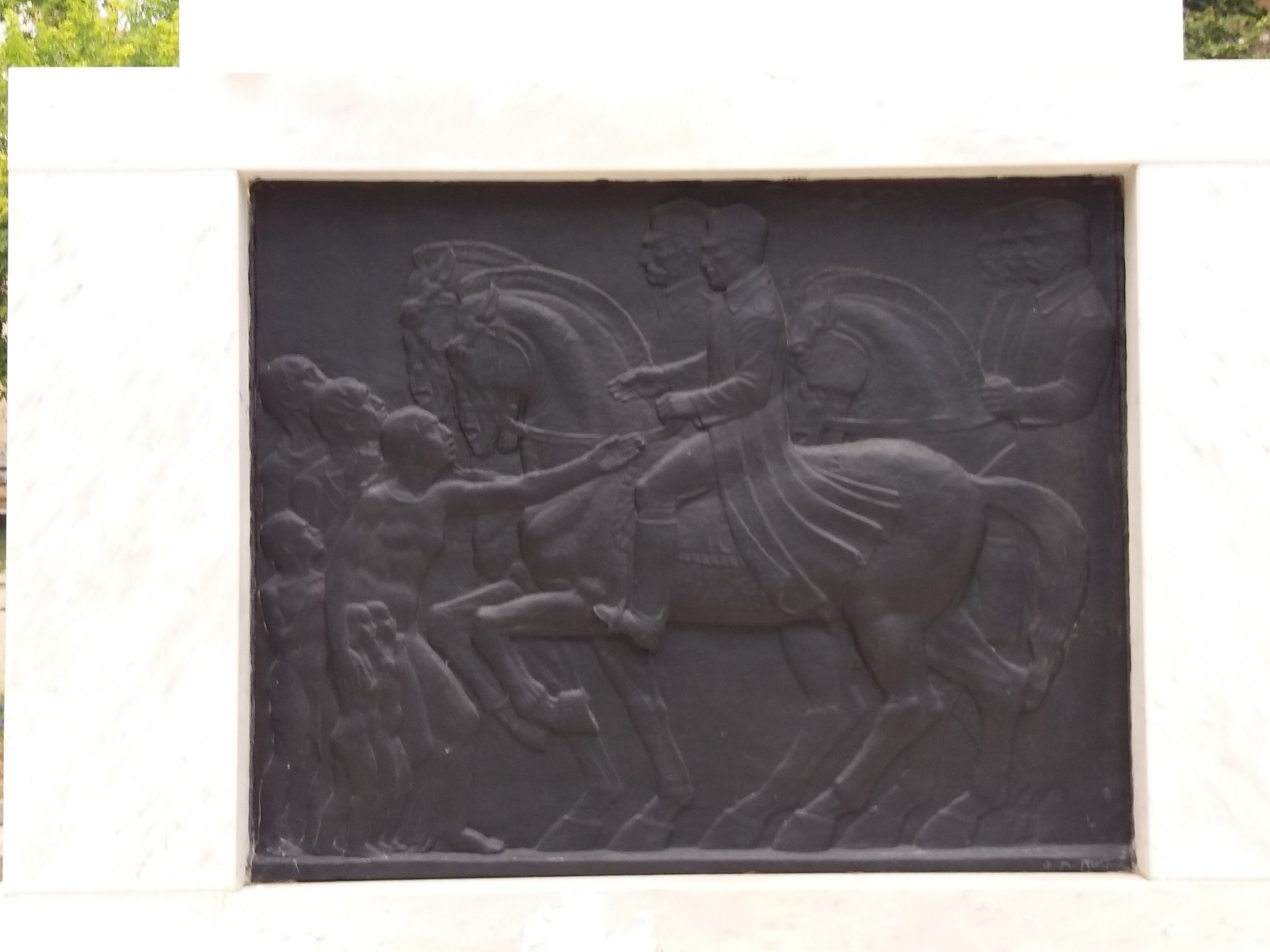 Srpski (latinica): Prokuplje